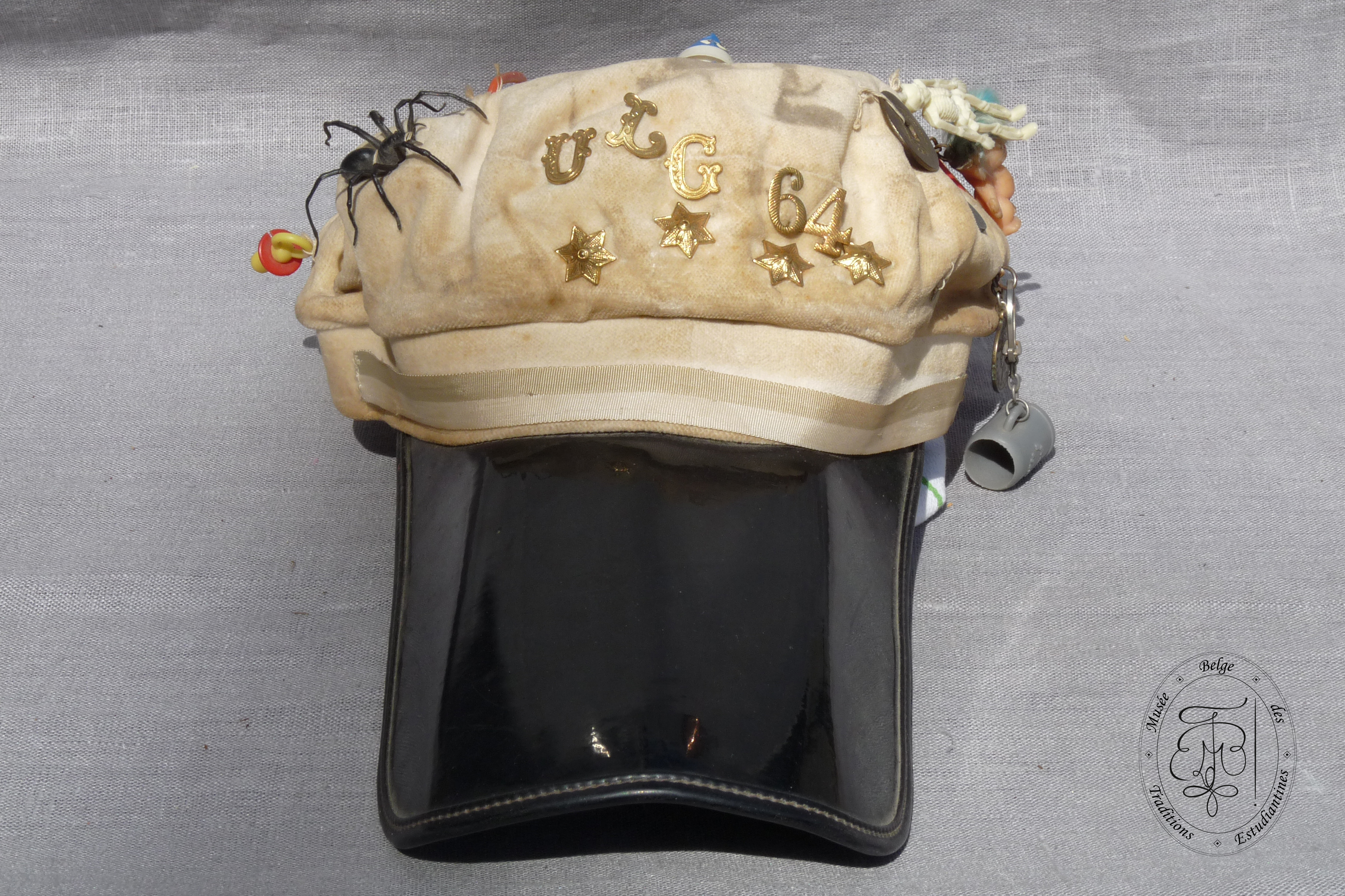 Penne d'étudiant en Philologie de l'université de Liège (portée par le professeur Robert Halleux dès 1964) Collection : Musée Belge des Traditions Estudiantines Don : Robert Halleux